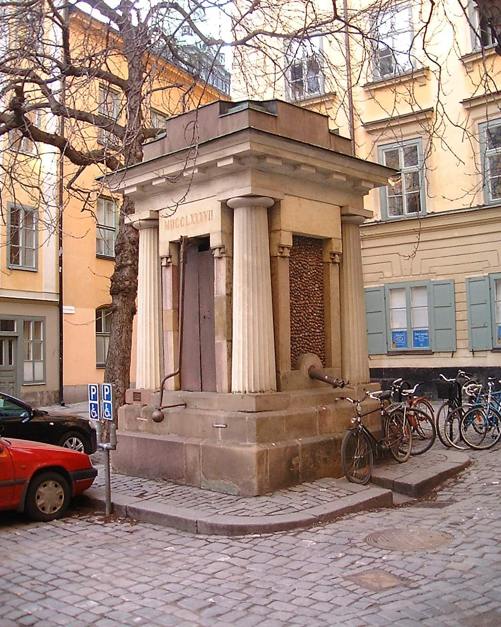 The well at Tyska Brunnsplan, Gamla stan, Stockholm.